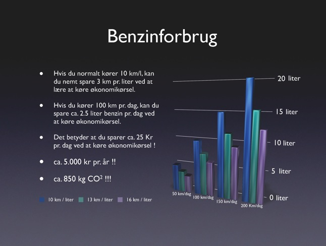 Fuel consumption